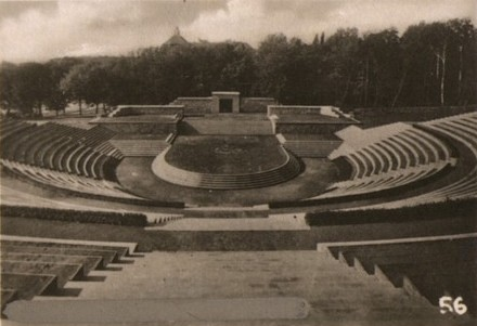 Alte Ansichtskarte von Borna Bez. Leipzig